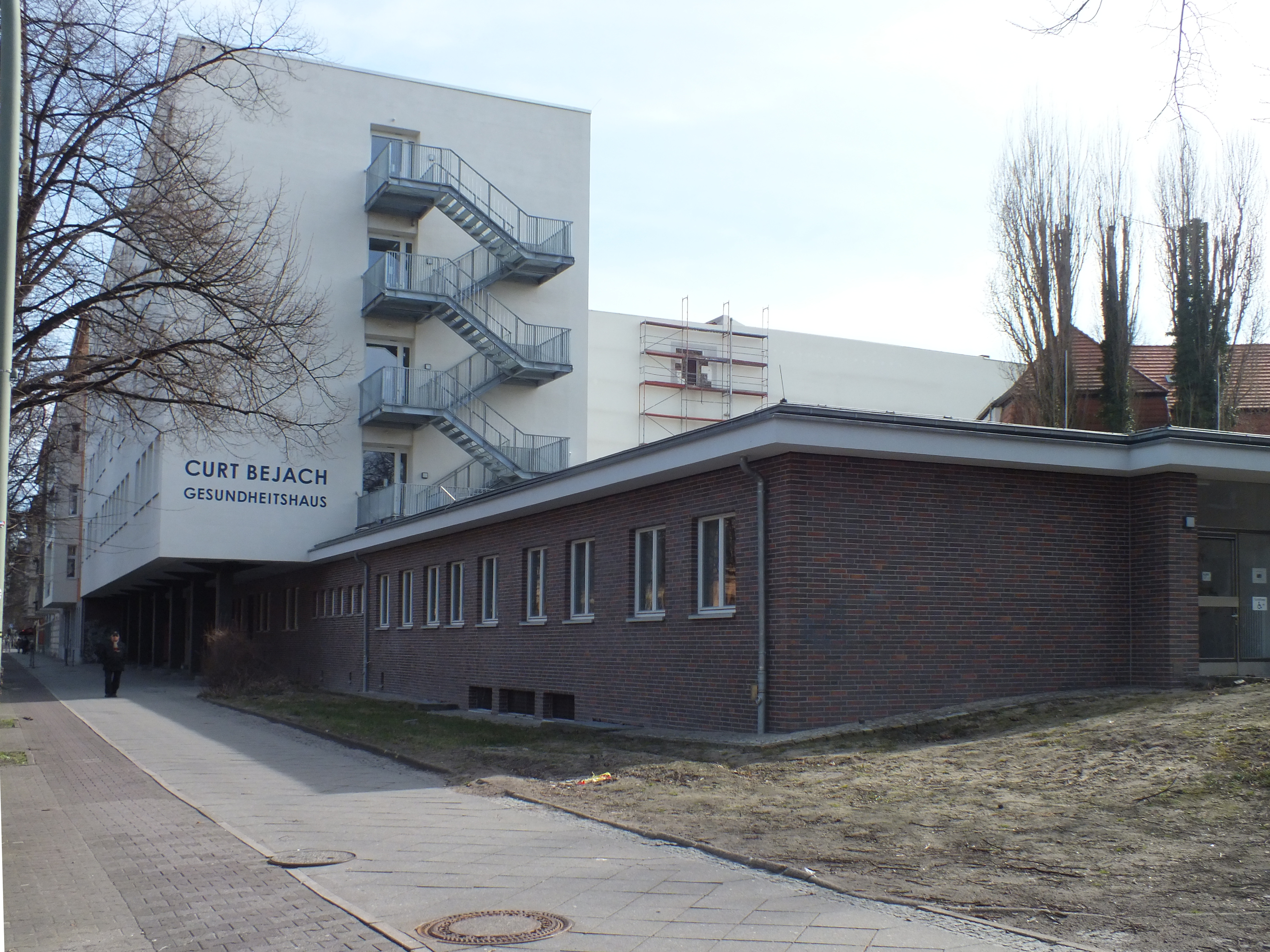 Fontanepromenade Ecke Urbanstr. in Kreuzberg